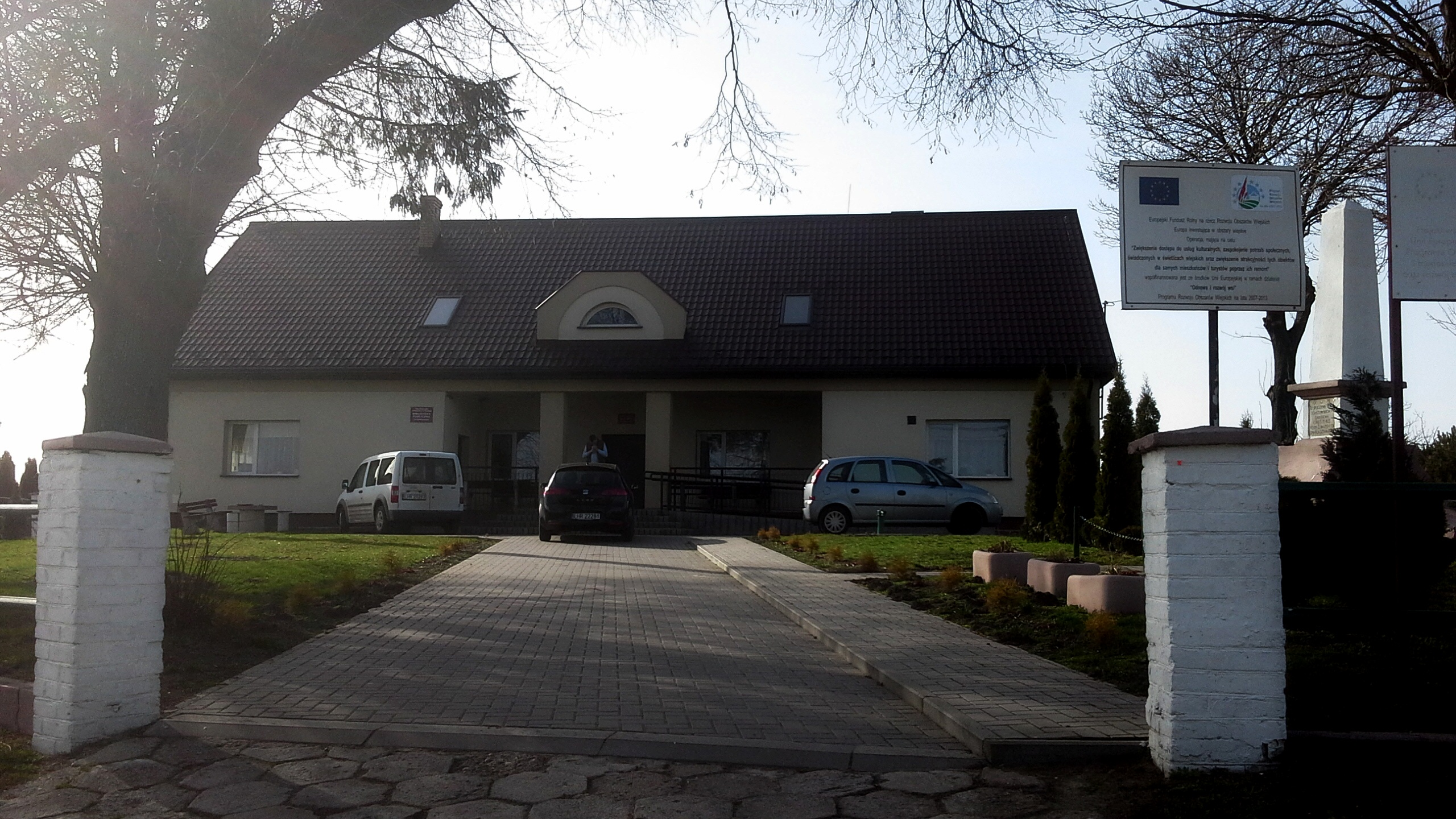 Nagrobek małżeństwa Grotthusów na dawnym placu przycerkiewnym w Dziekanowie oraz budynek biblioteki położony na miejscu cerkwi